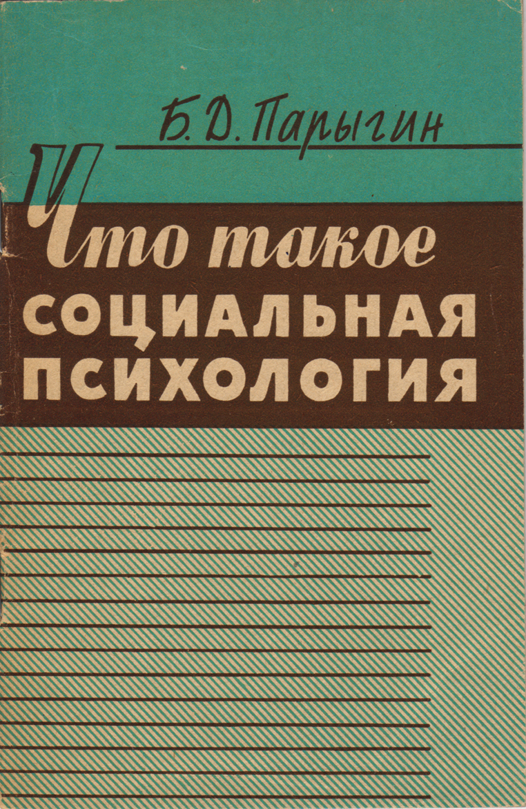 Что такое социальная психология/ обложка брошюры.